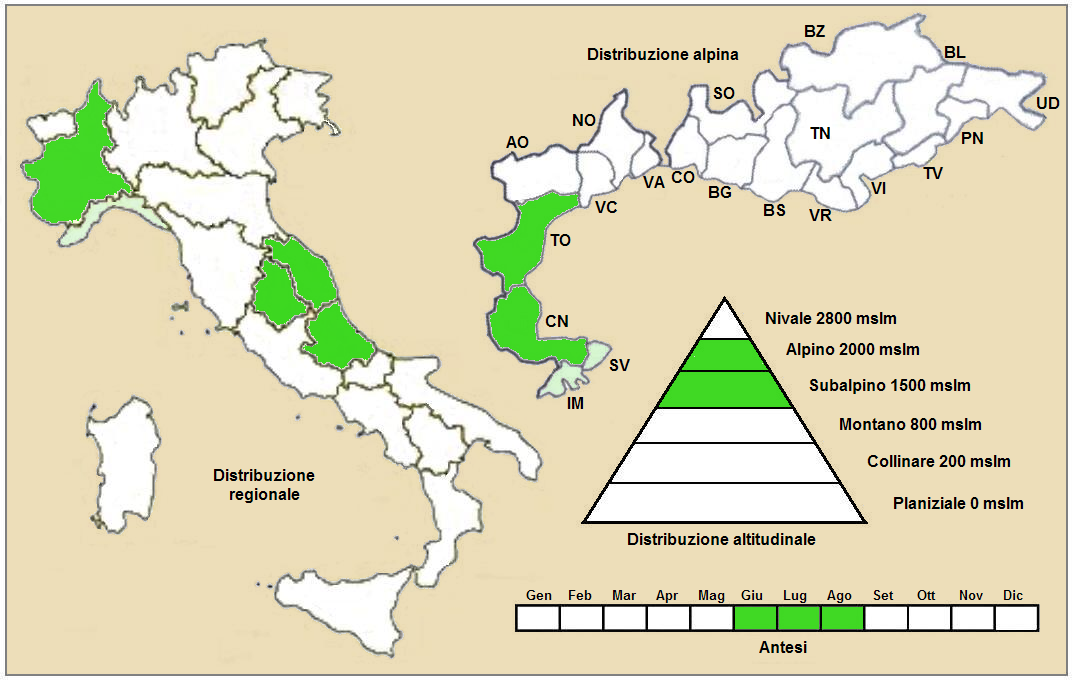 Artemisia umbelliformis eriantha – Distribuzione